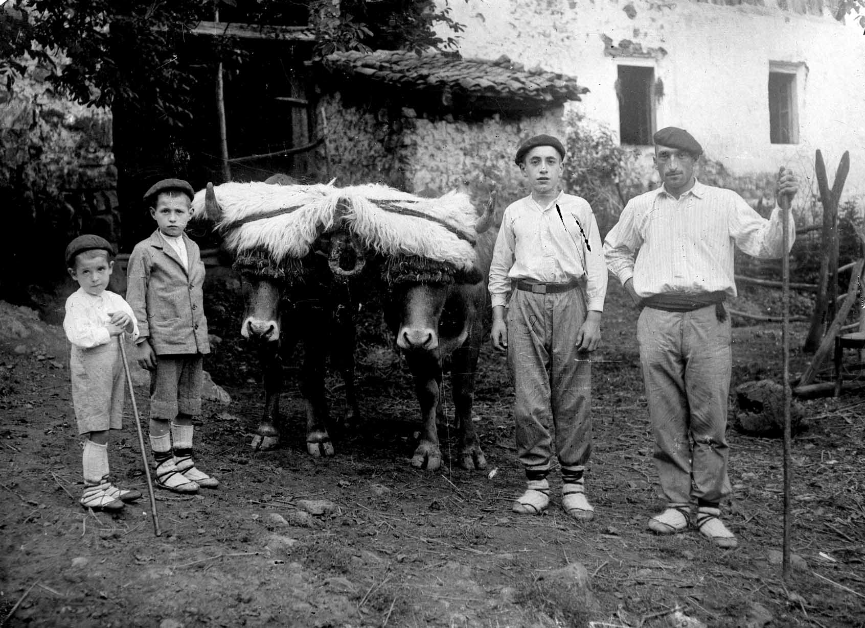 Aita semeekin eta idi bikotearekin etxeko atarian. Urtea eta kokapena ezezagunak dira